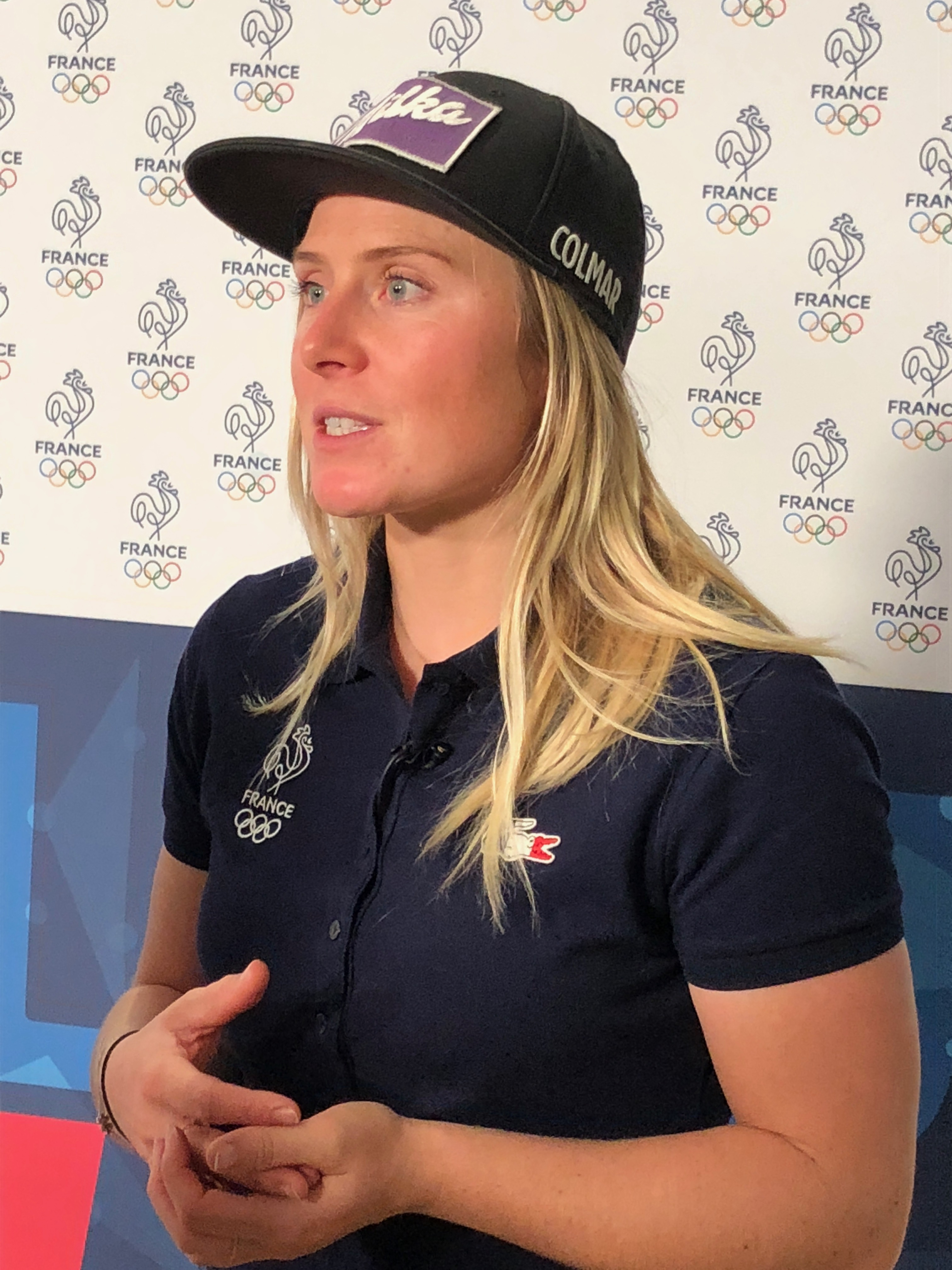 La skieuse française Tessa Worley en octobre 2017 à Paris